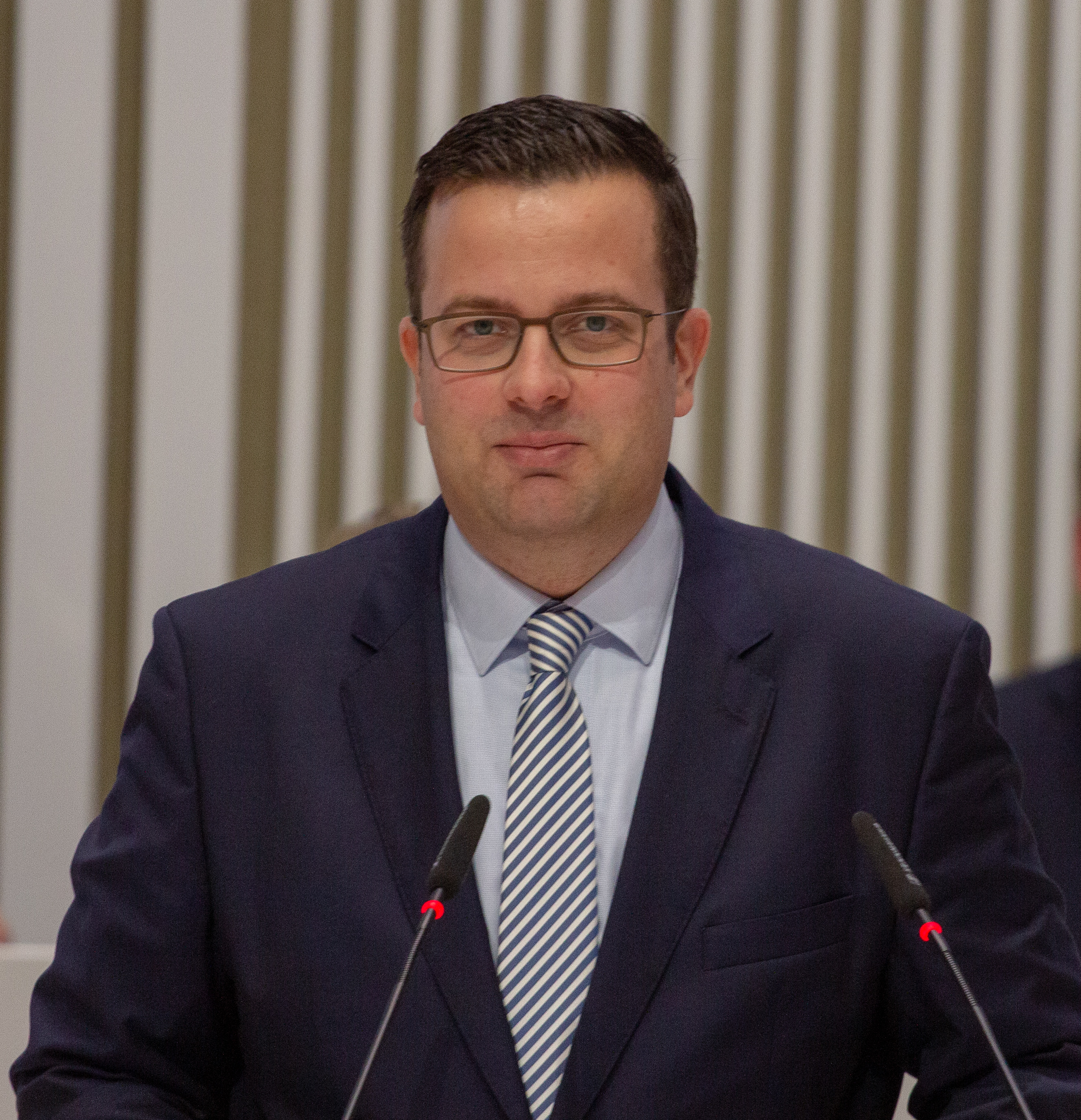 Sebastian Ehlers im Plenum des Landtages Mecklenburg-Vorpommern im März 2019.